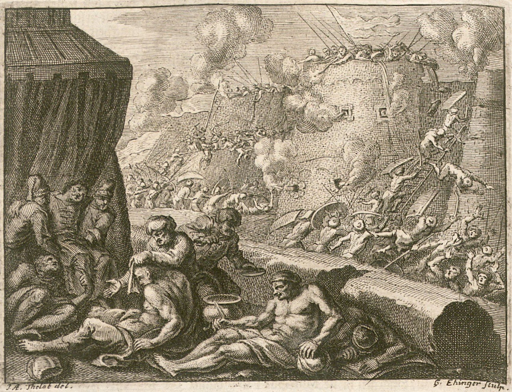 Rycaut, Paul; Sagredo, Giovanni Die Neu-eröffnete Ottomannische Pforte: Bestehend: Erstlichen, In einer ... Beschreibung Deß gantzen Türckischen Staats- und Gottesdiensts (Band 1) — Augsburg, 1694, p.276